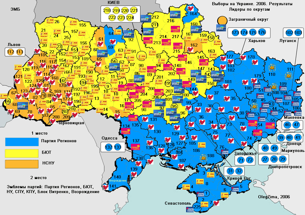 map